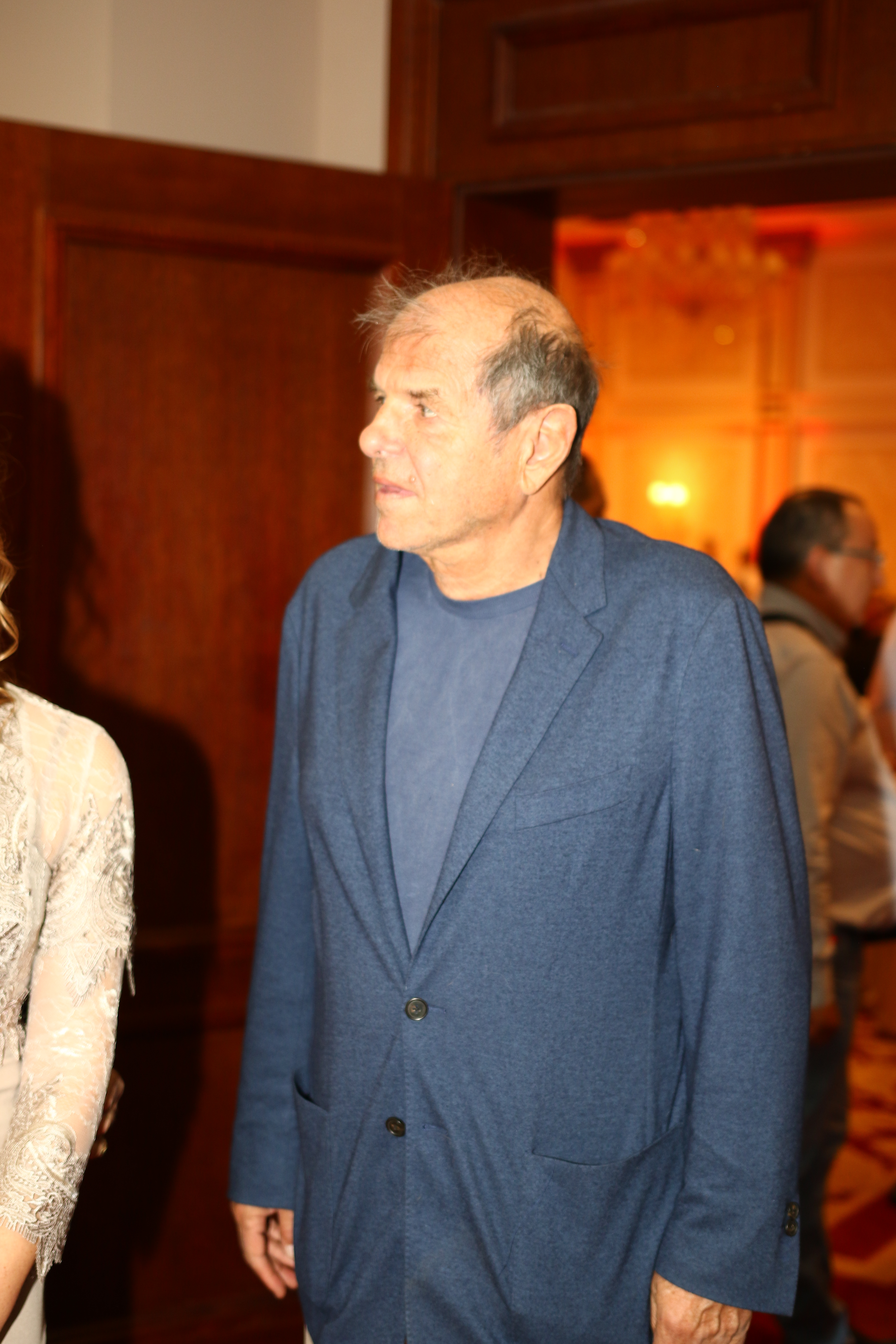 Тома Николов Томов - български журналист, автор на документални филми, публицист.